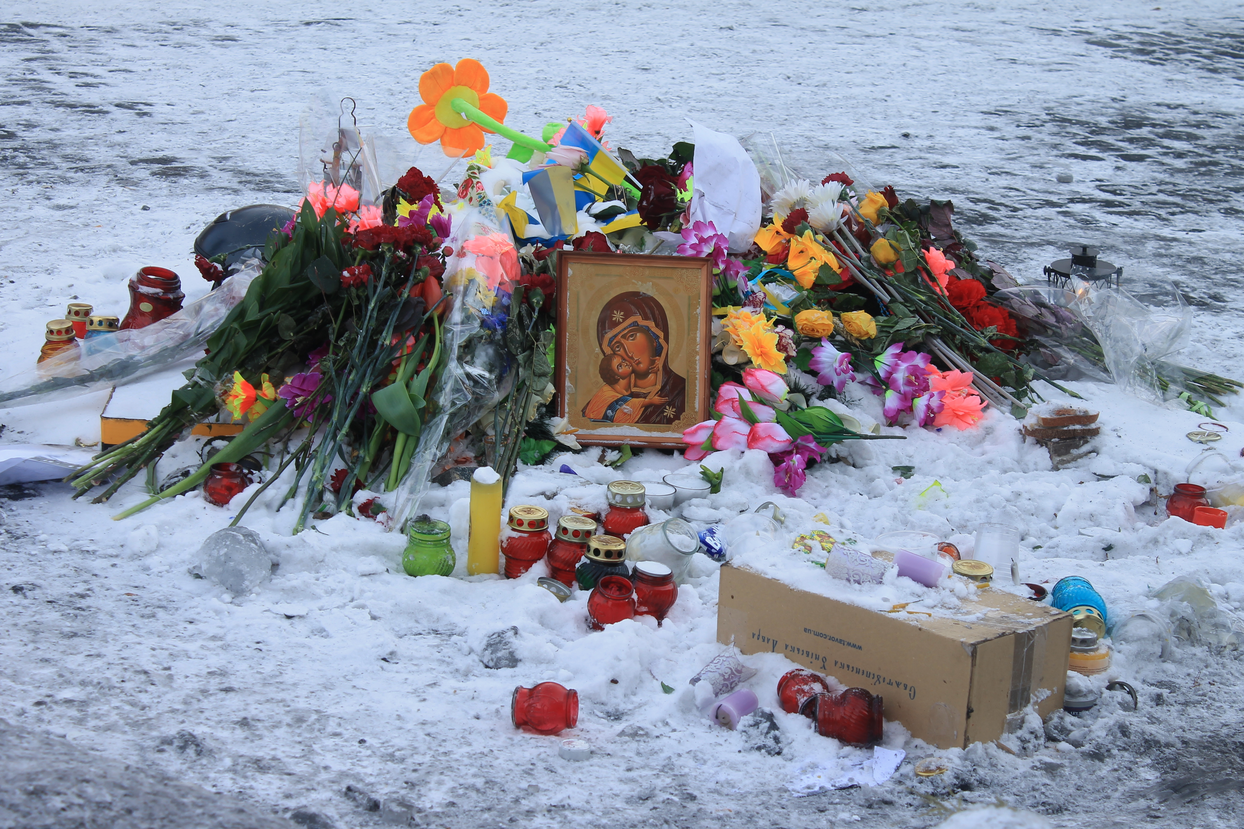 Київ 29 січня 2014. Квіти у пам'ять загиблим героям Євромайдану поблизу Європейської площі